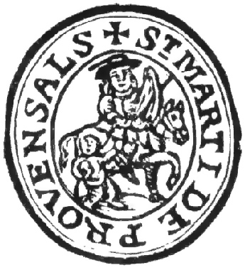 Primer segell de l'antic municipi de Sant Martí de Provençals (Cataluya, Espanya)